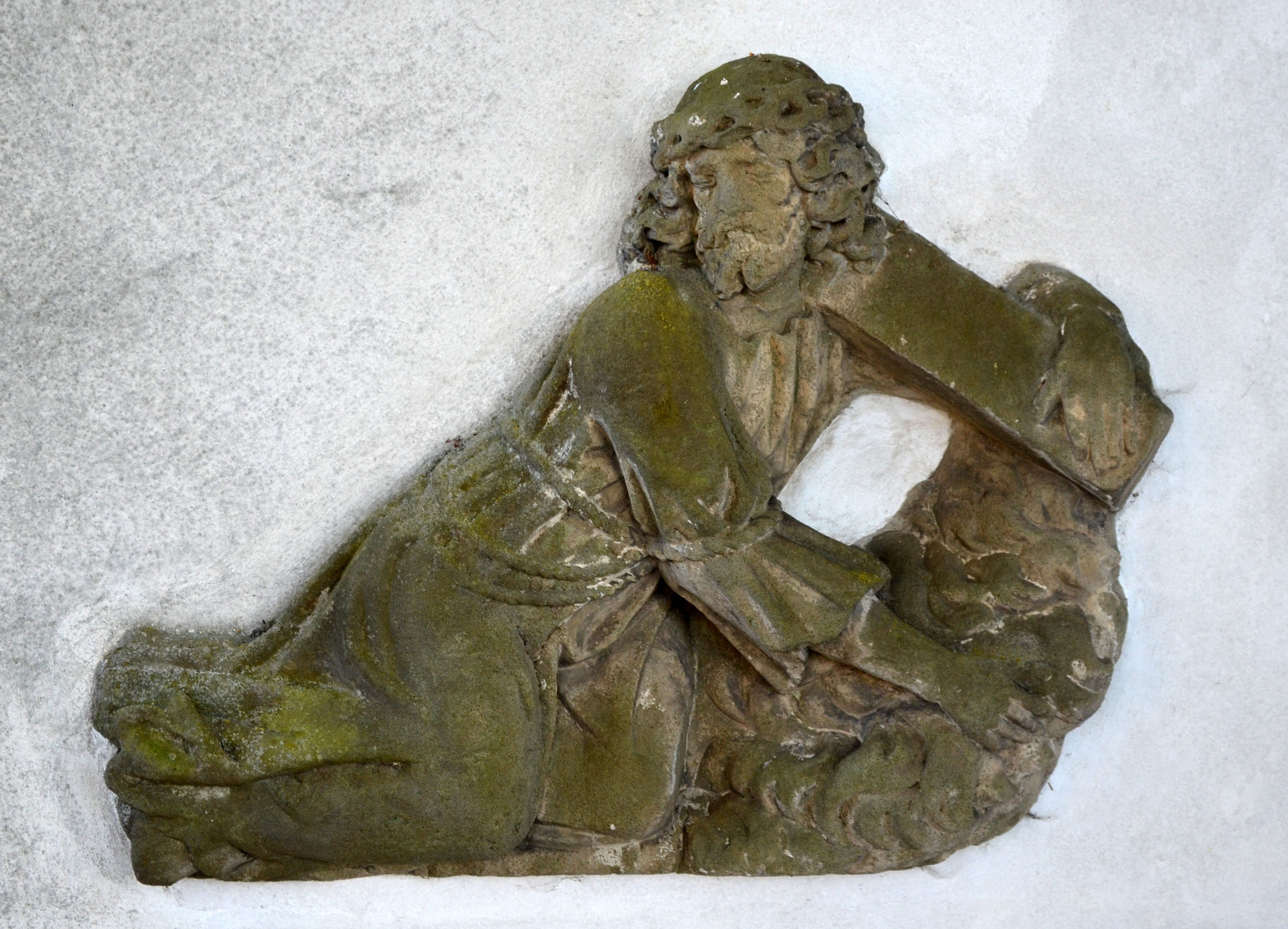 Brilon, Wülfte St. Anna Außenwand, Relief